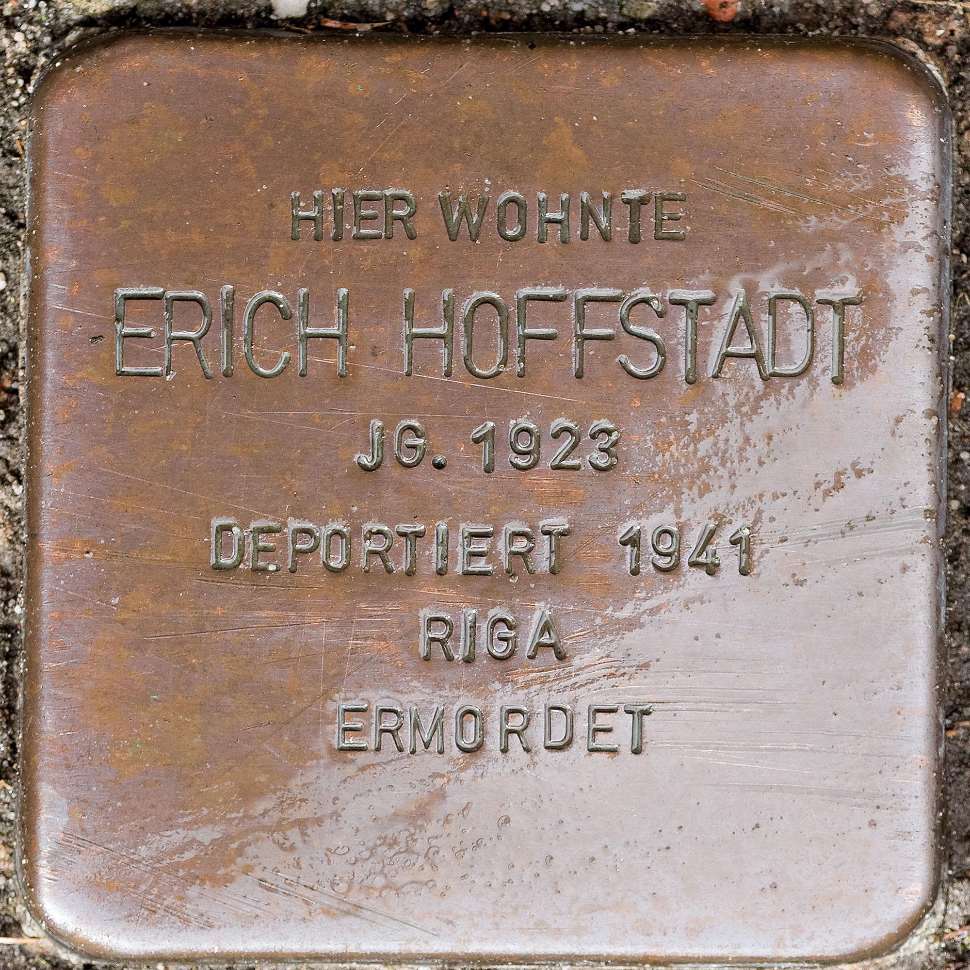 Stolpersteine Straelen: Hoffstadt, Erich